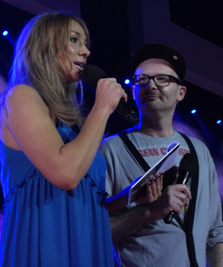 Zdjęcie zrobione podczas Eska Music Awards 2011 w katowickim Spodku.